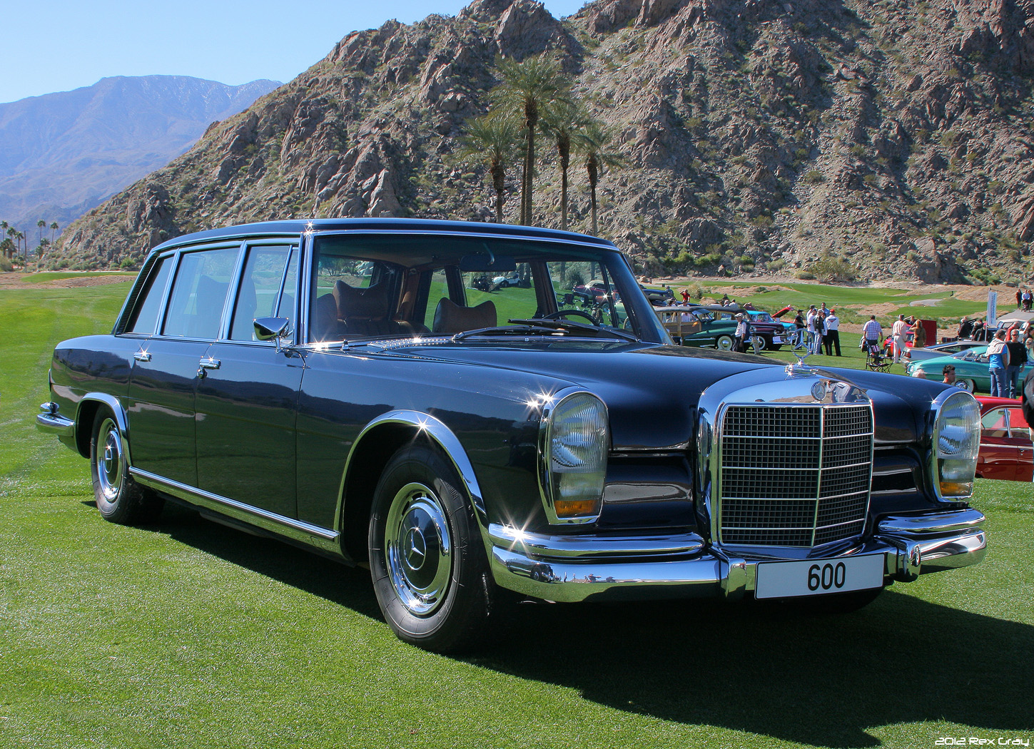 1969 Mercedes-Benz 600 - fvr